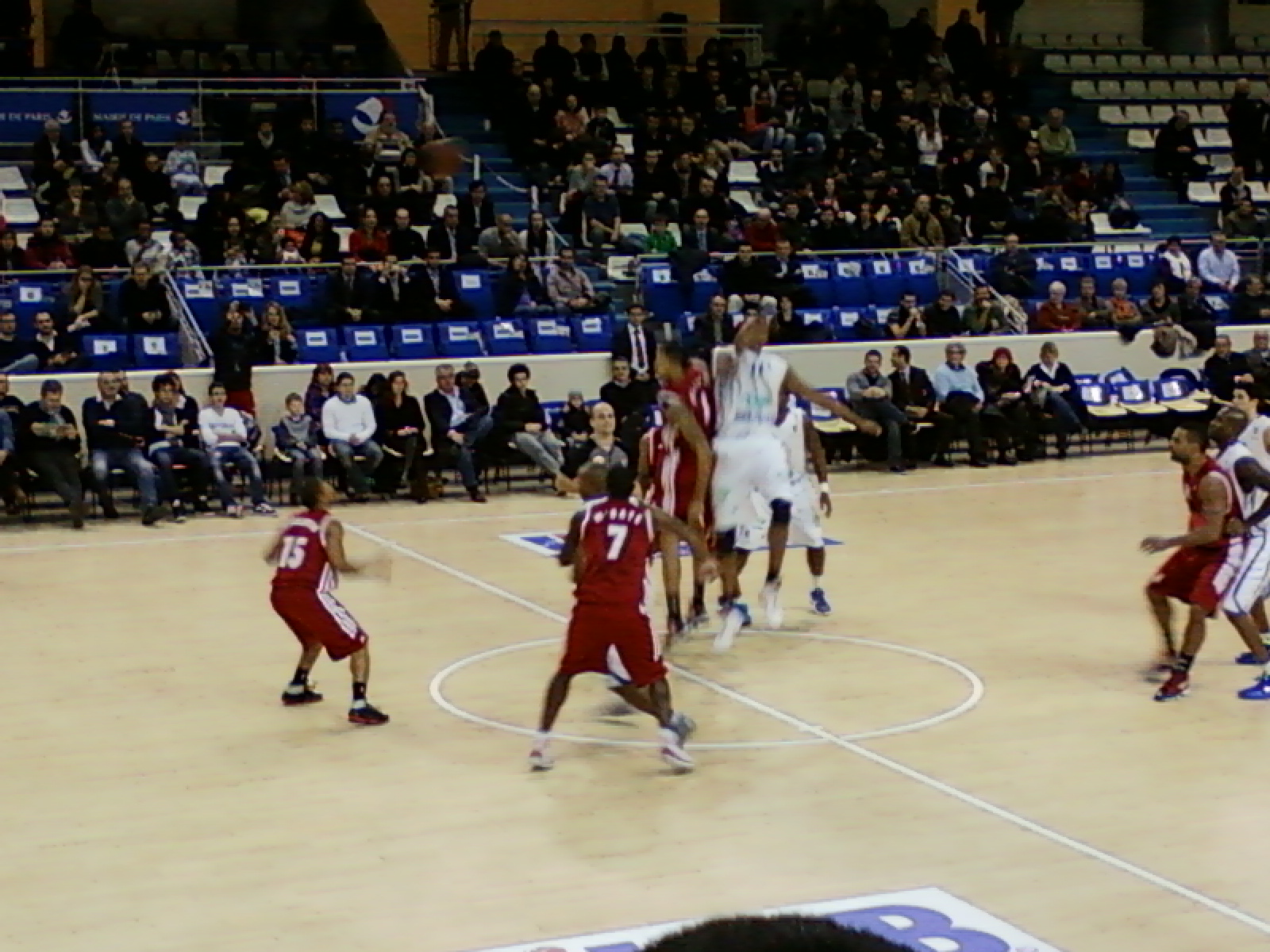 Coup d'envoi du match Paris-Levallois - Strasbourg en Pro A le 16 décembre 2011 au Stade Pierre-de-Coubertin